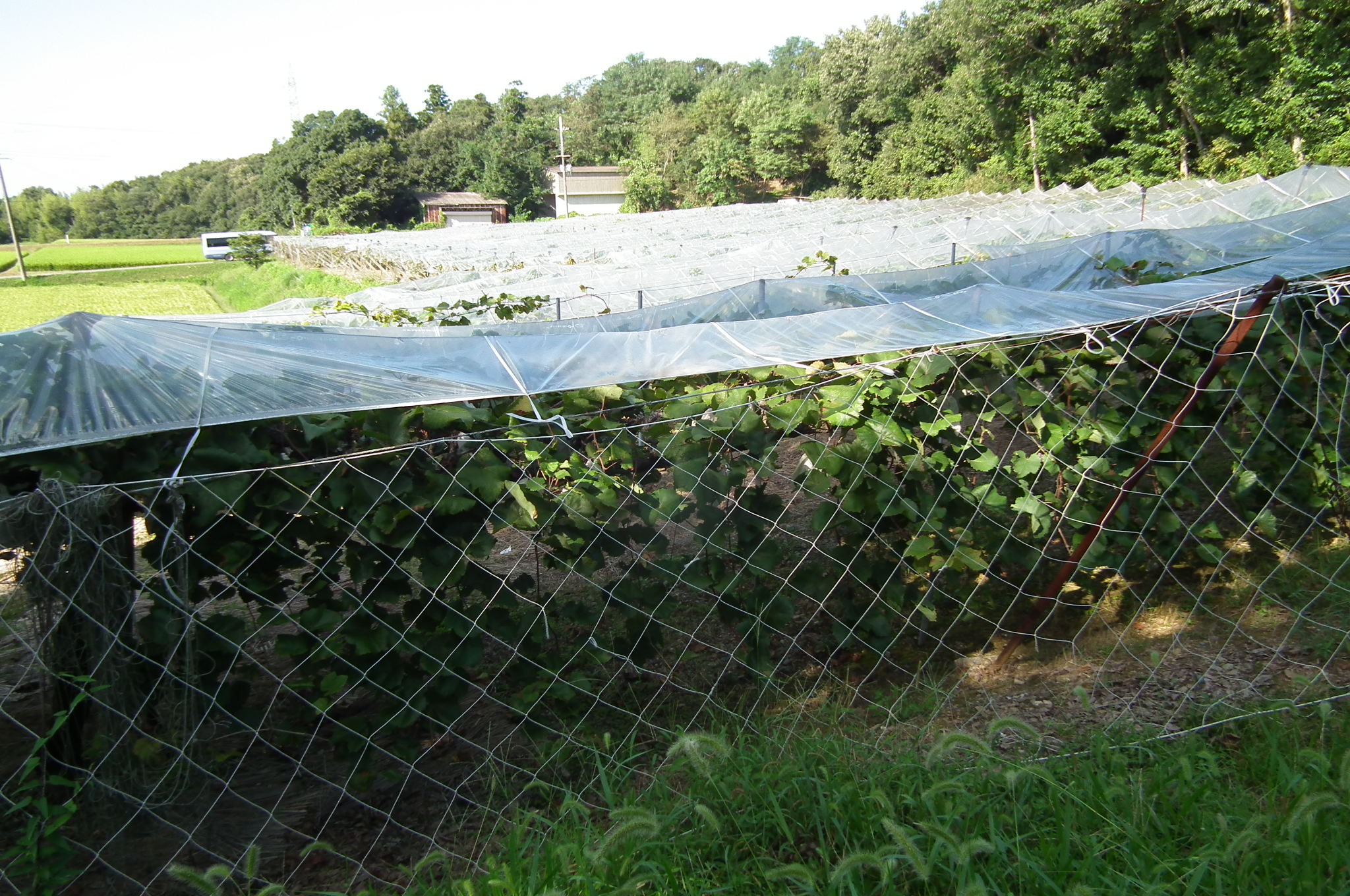 Hirai-grape farm Hirai,Miki,Hyogo 兵庫県三木市平井平井ぶどう園 竹中重治-竹中半兵衛横